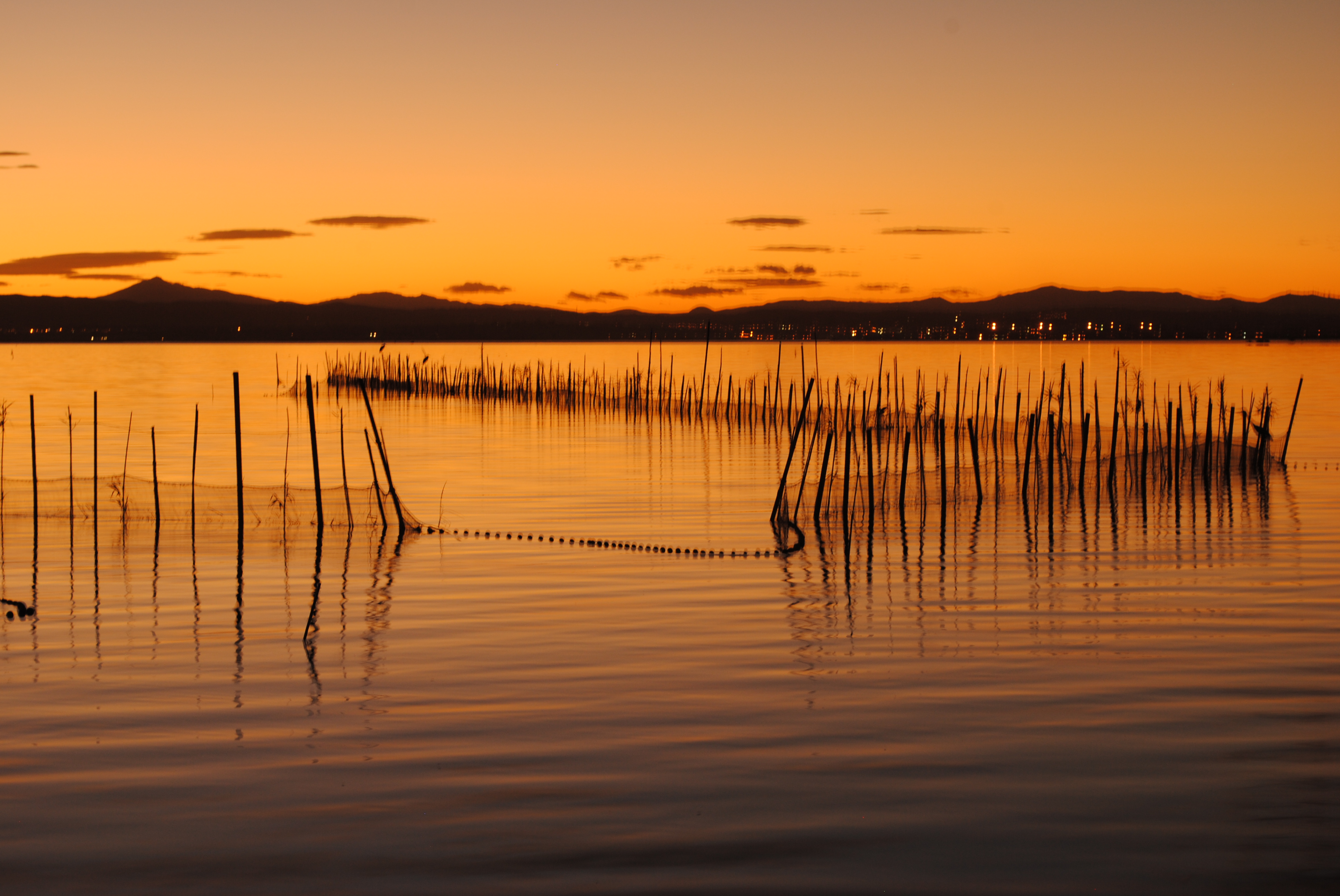 El Parque natural de la Albufera o La Albufera (Albufera, del árabe البحيرة al-buhayra, "el pequeño mar") es un parque natural de la provincia de Valencia, en la Comunidad Valenciana, España. Fue también conocido por los romanos como Nacarum Stagnum y en algunos poemas árabes se le denomina Espejo del sol. Este paraje de 21.120 ha, que fue nombrado parque natural por la Generalidad Valenciana el 23 de julio de 1986, se encuentra situado a unos 10 km al sur de la ciudad de Valencia. El parque natural comprende el sistema formado por la Albufera propiamente dicha, su entorno húmedo, y el cordón litoral adyacente a ambos.1 This is a photography of a Special Area of Conservation in Spain with the ID: ES0000023. Natura2000 entry, EEA entry